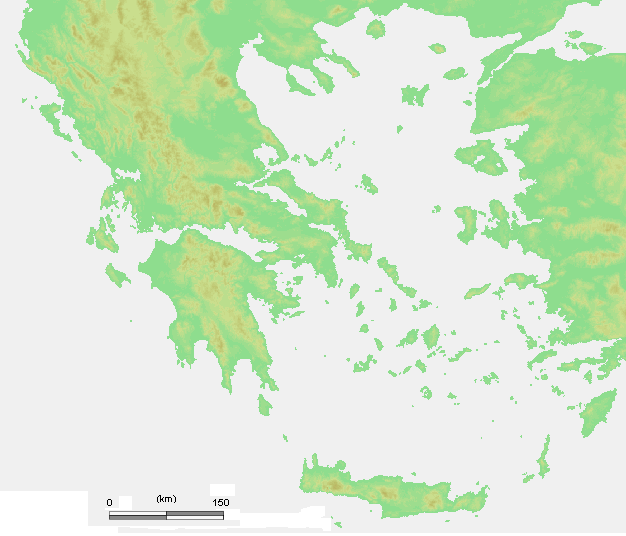 Greece islands.PNG (Greek island)